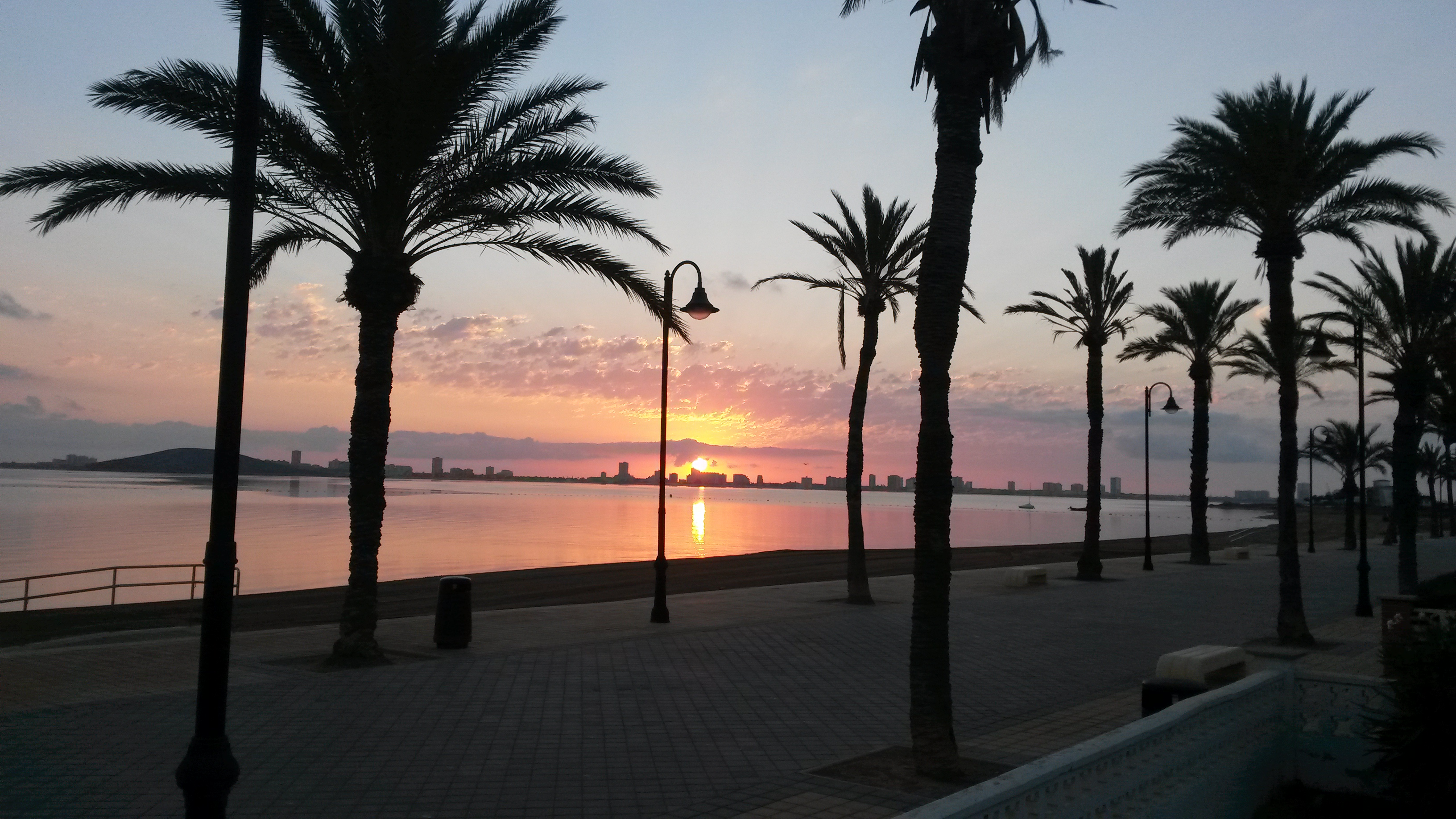 Amanecer en el Mar Menor - Cartagena - España